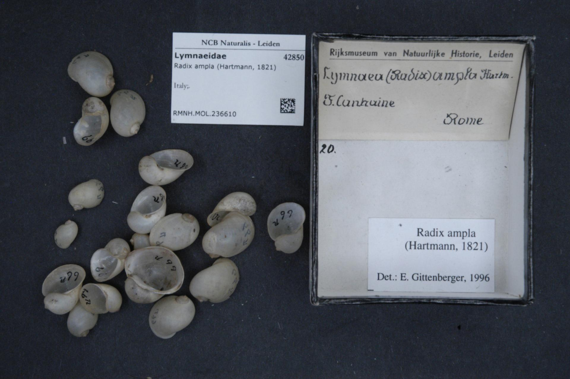 Radix ampla (Hartmann, 1821)